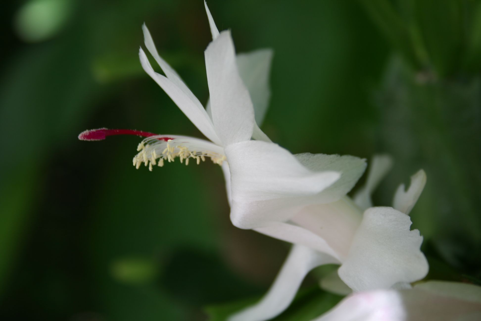 Schlumbergera truncata (Rhipsalideae; Cactaceae; Planta) kaktusz 'Malissa' változatának virága